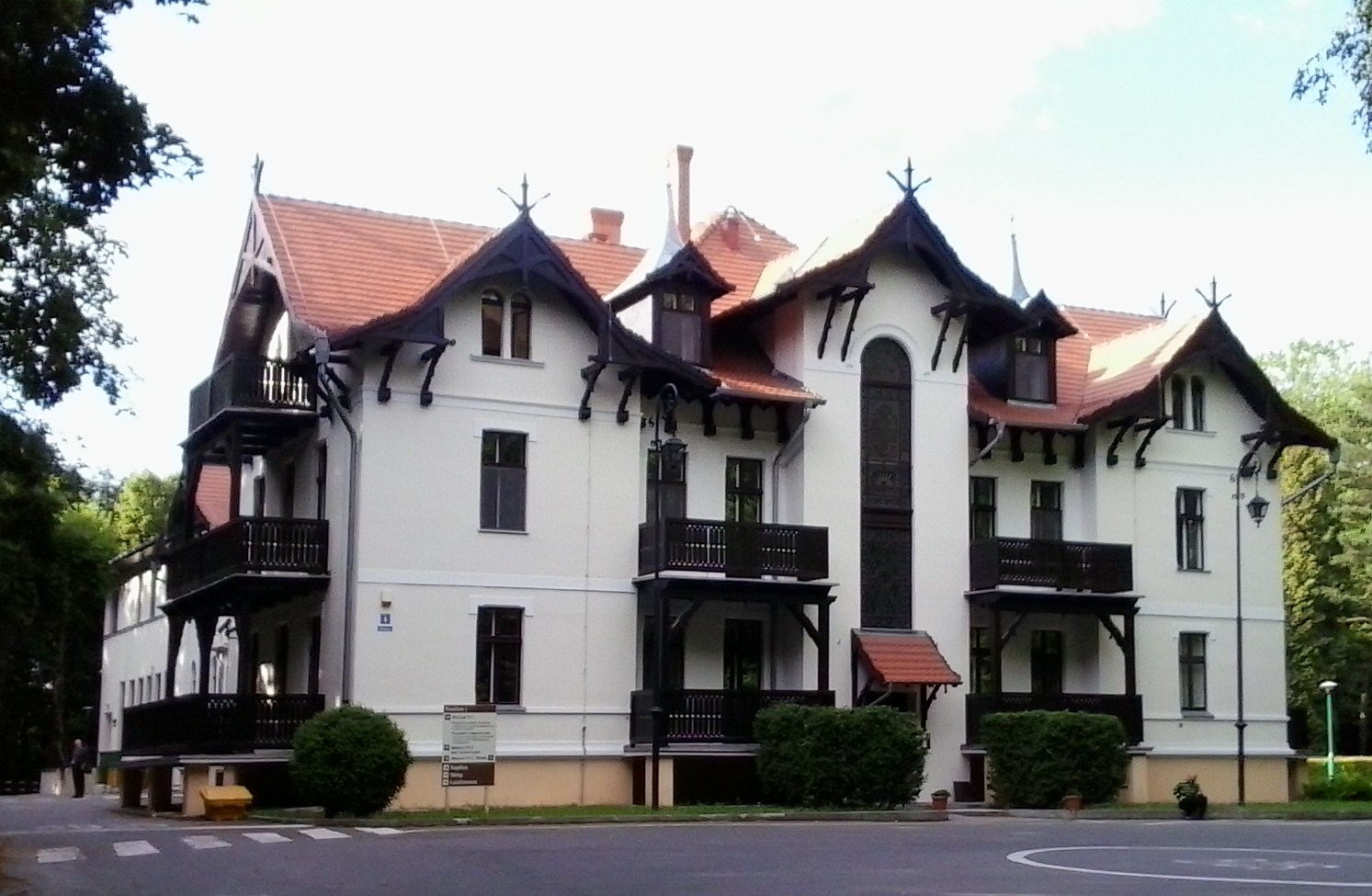 Sanatorium w Ludwikowie - pawilon nr 1.